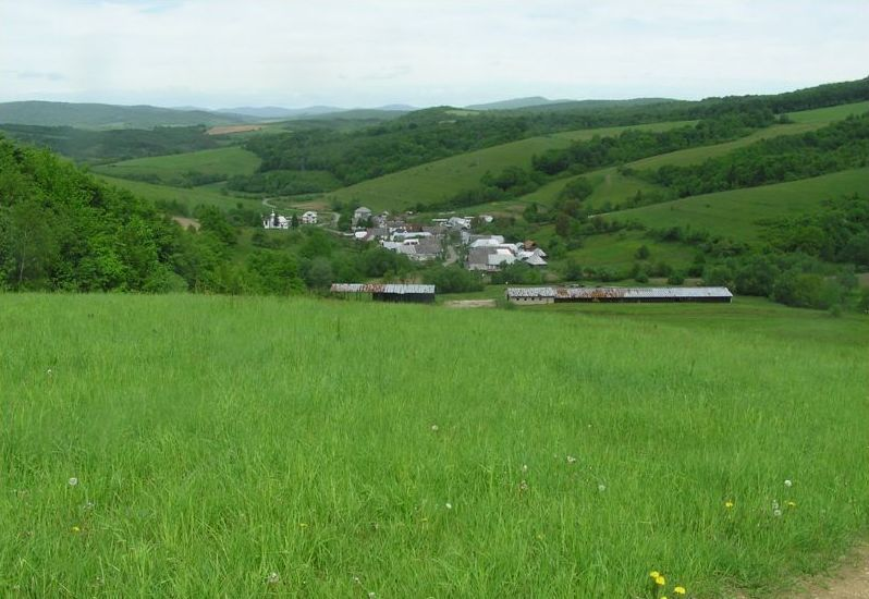 Celkový pohľad